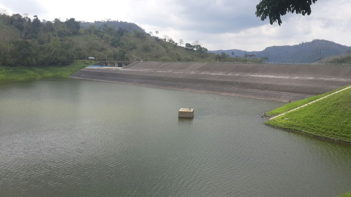 Foto panoramica de la represa Poza Honda (Manabí)